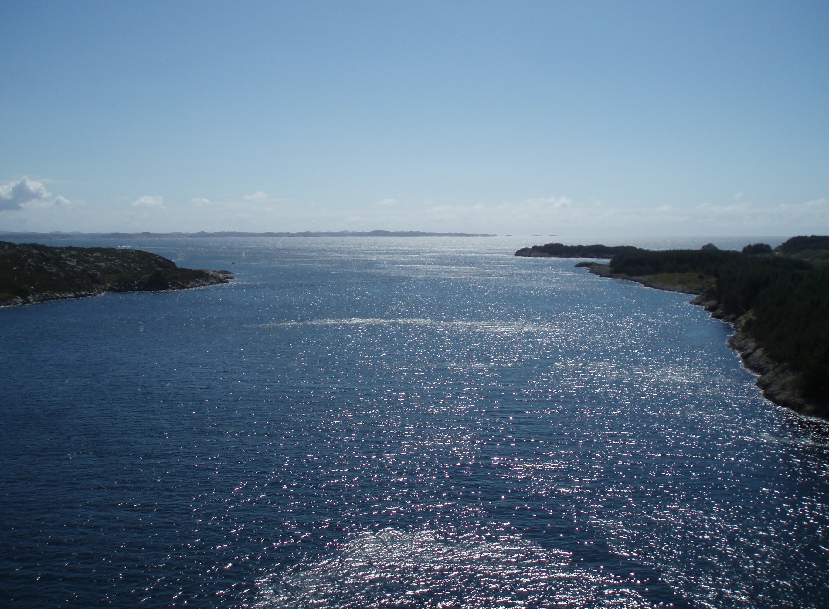 Selbjørnsfjorden seen from Stolmasundet in Austevoll, Hordaland, Norway.